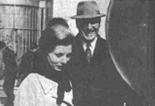 Juan Domingo Perón y su esposa, María Estela Martínez de Perón (Isabel), en las calles de Madrid, década de 1960.